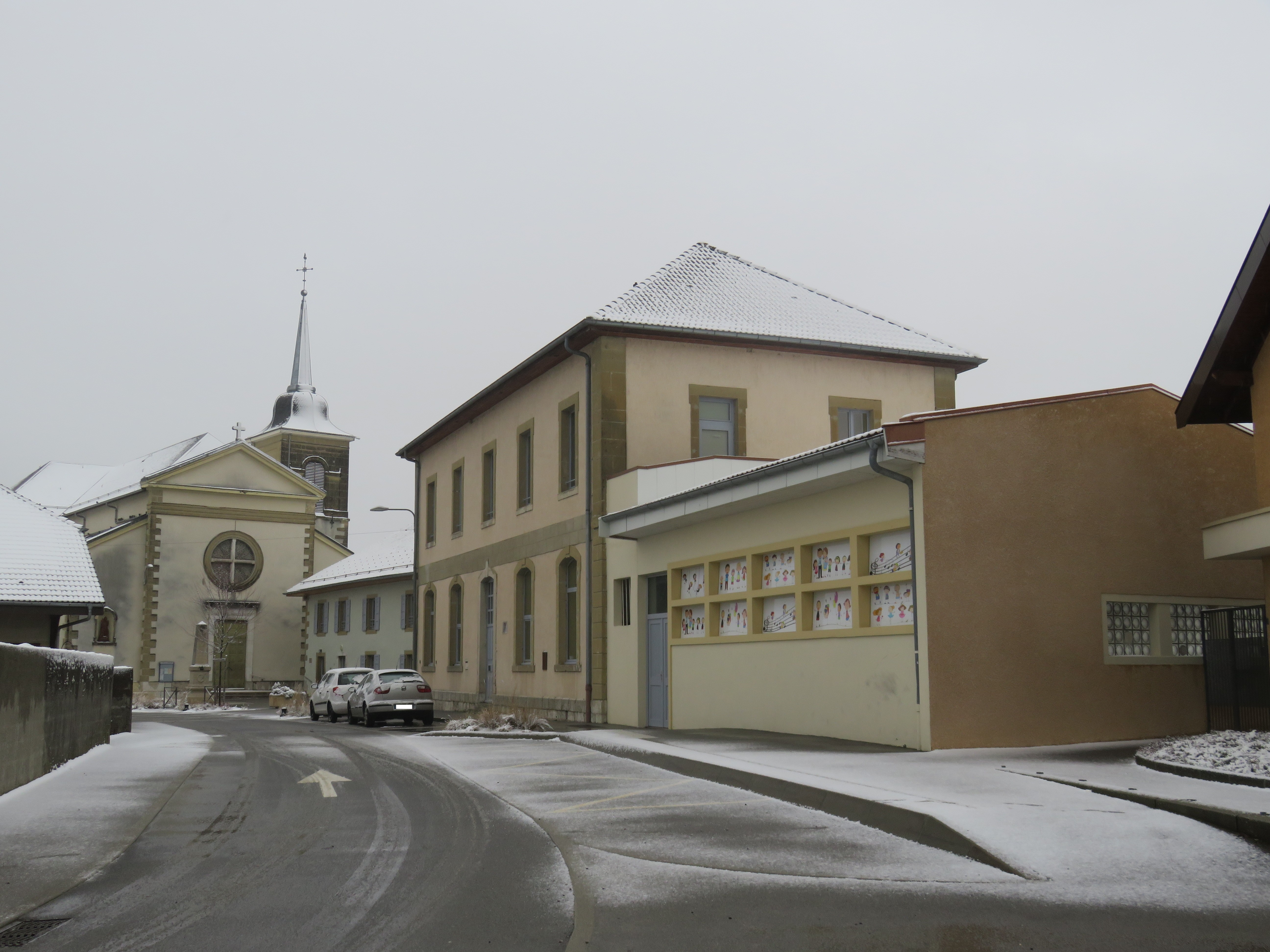 La Rue des Écoles (Marcellaz-Albanais, France) le 27 février 2020.